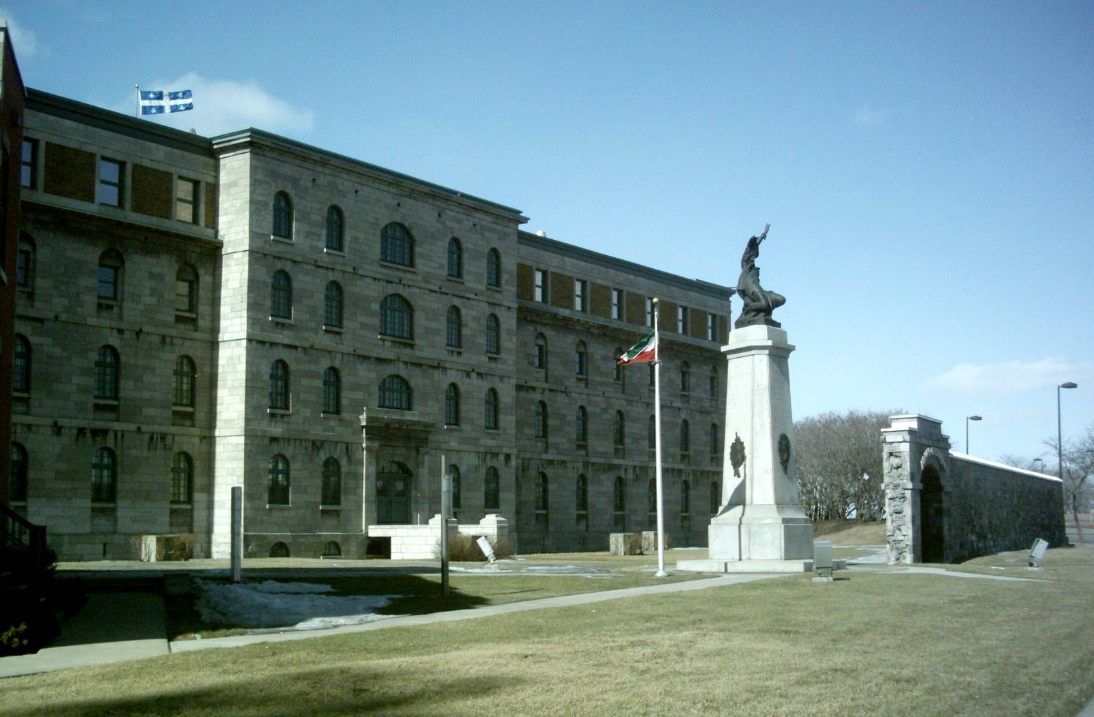 Prison du Pied-du-Courant, aujourd'hui siège social de la Société des alcools du Québec